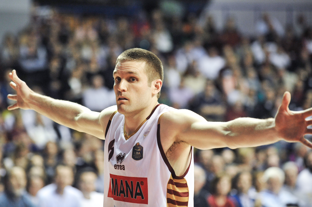 Michael Bramos con la maglia della Reyer Venezia